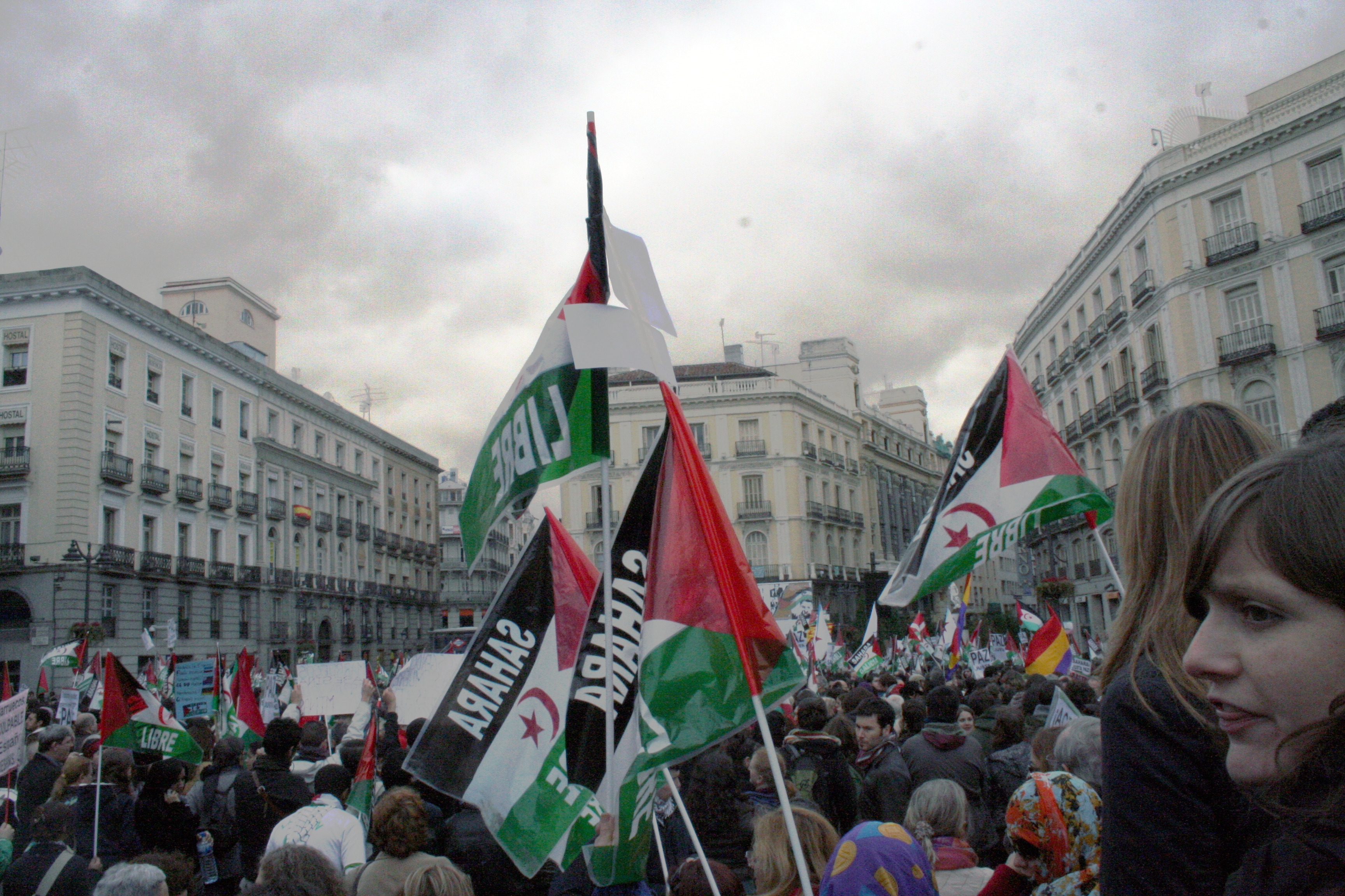 Manifestación en Madrid, España, el 14 de junio de 2010 contra el asalto al campamento saharaui de Agdaym Izik.